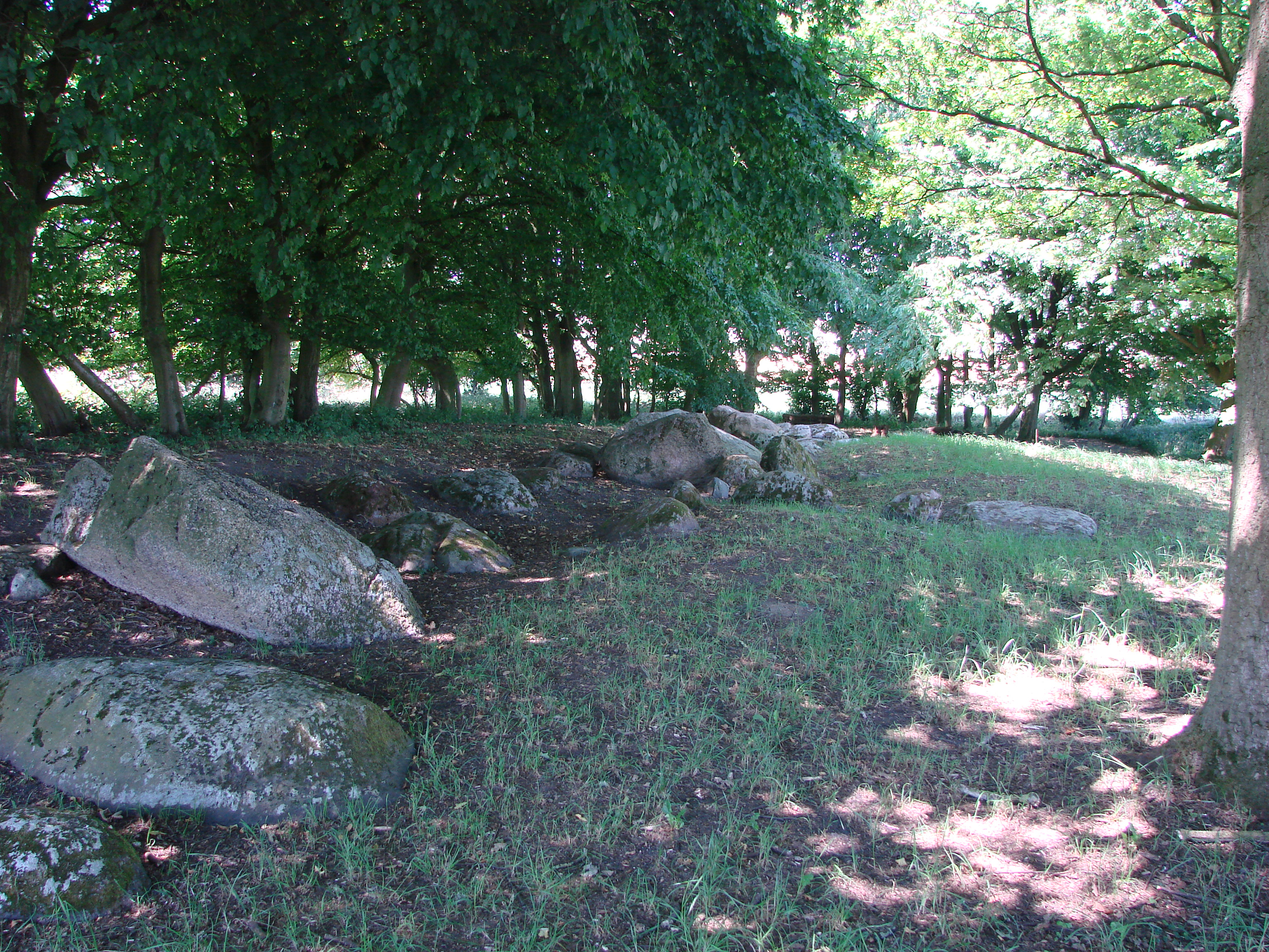 Großsteingrab